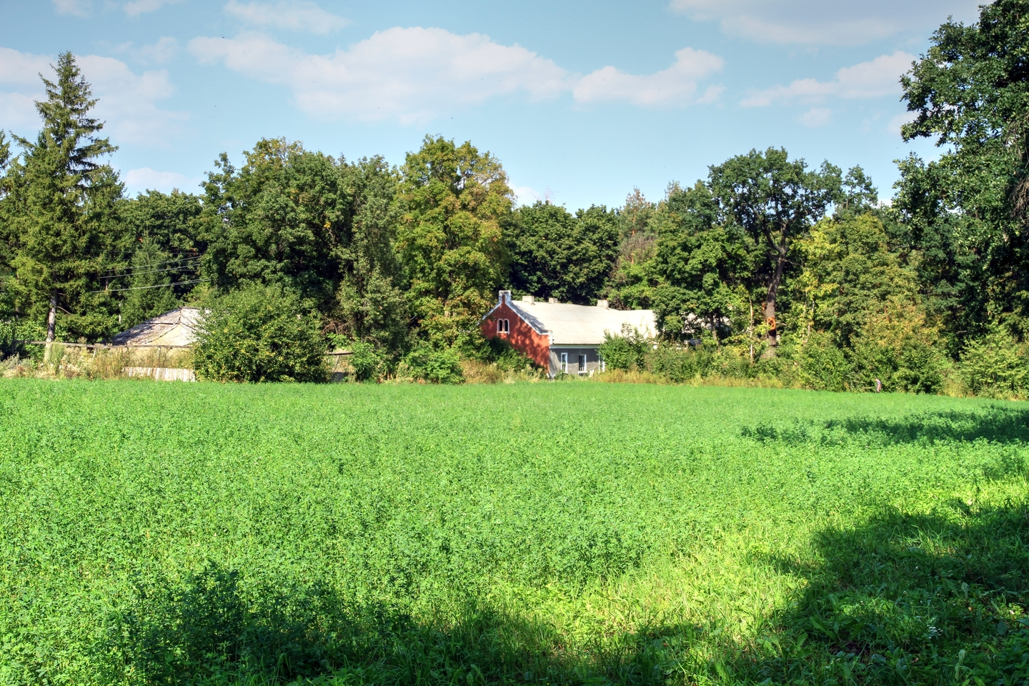 Хинкэуцкий парк, монумент природы, находится в Единецкий район, с. Хинкэуць (код MD-ED-map-014)